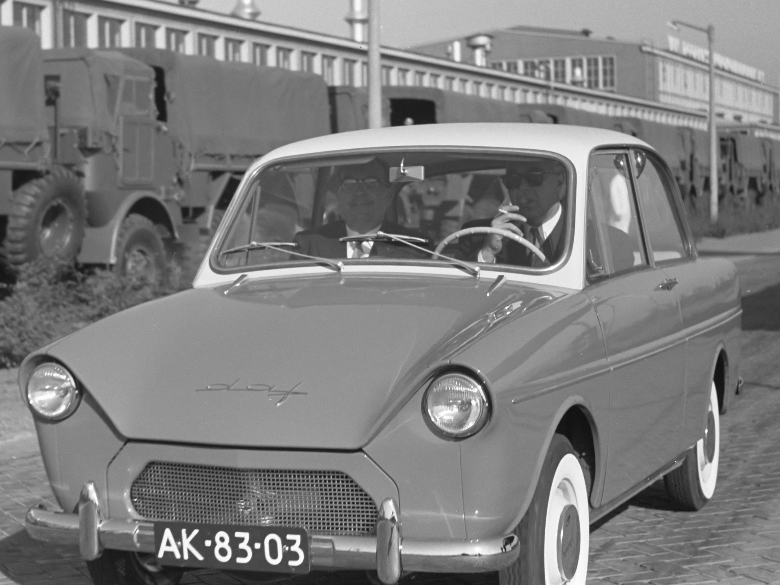 Prins Bertil van Zweden bezoekt DAF fabrieken. Tijdens een proefrit. Location: Born